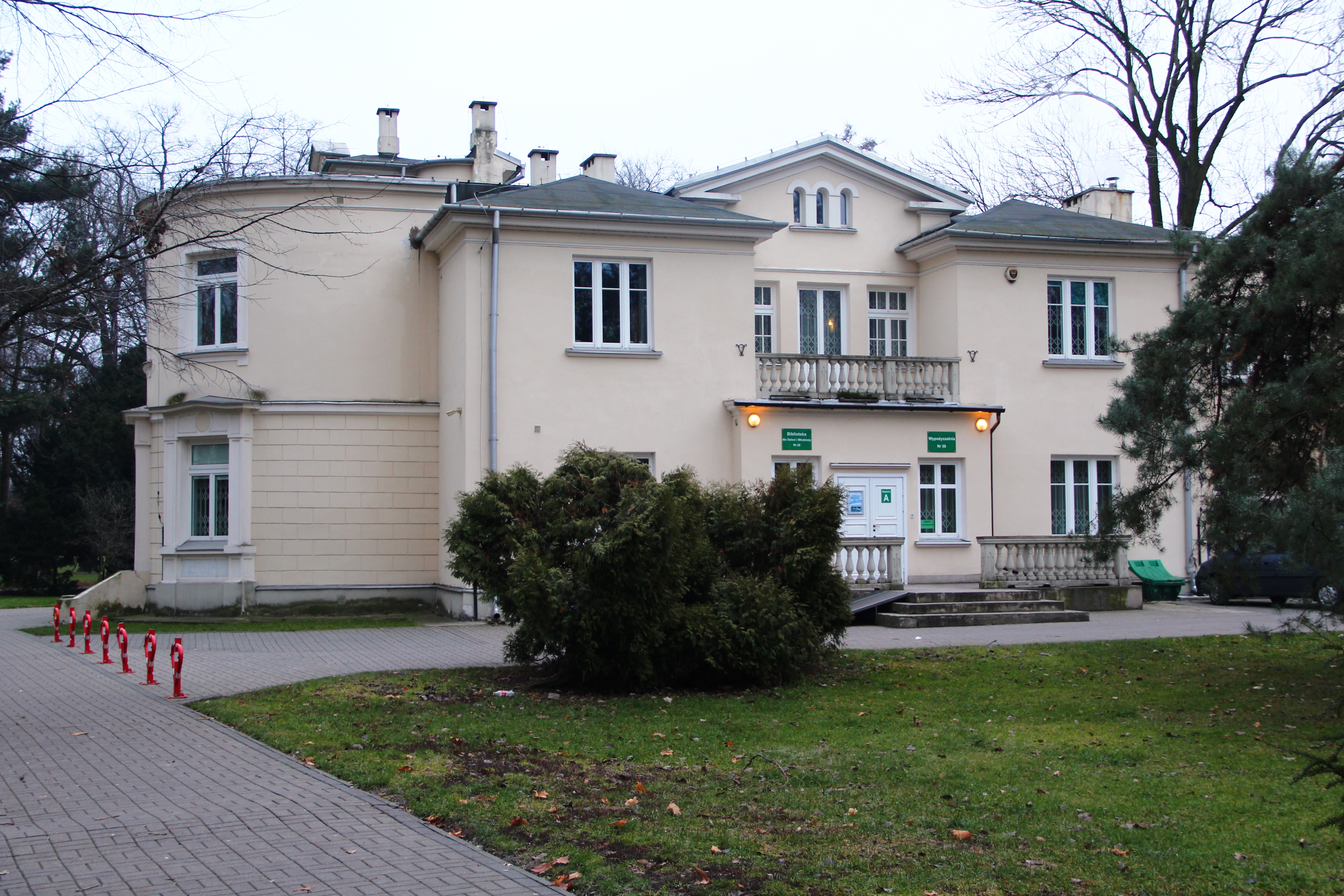 Koelichen Palace in Warsaw